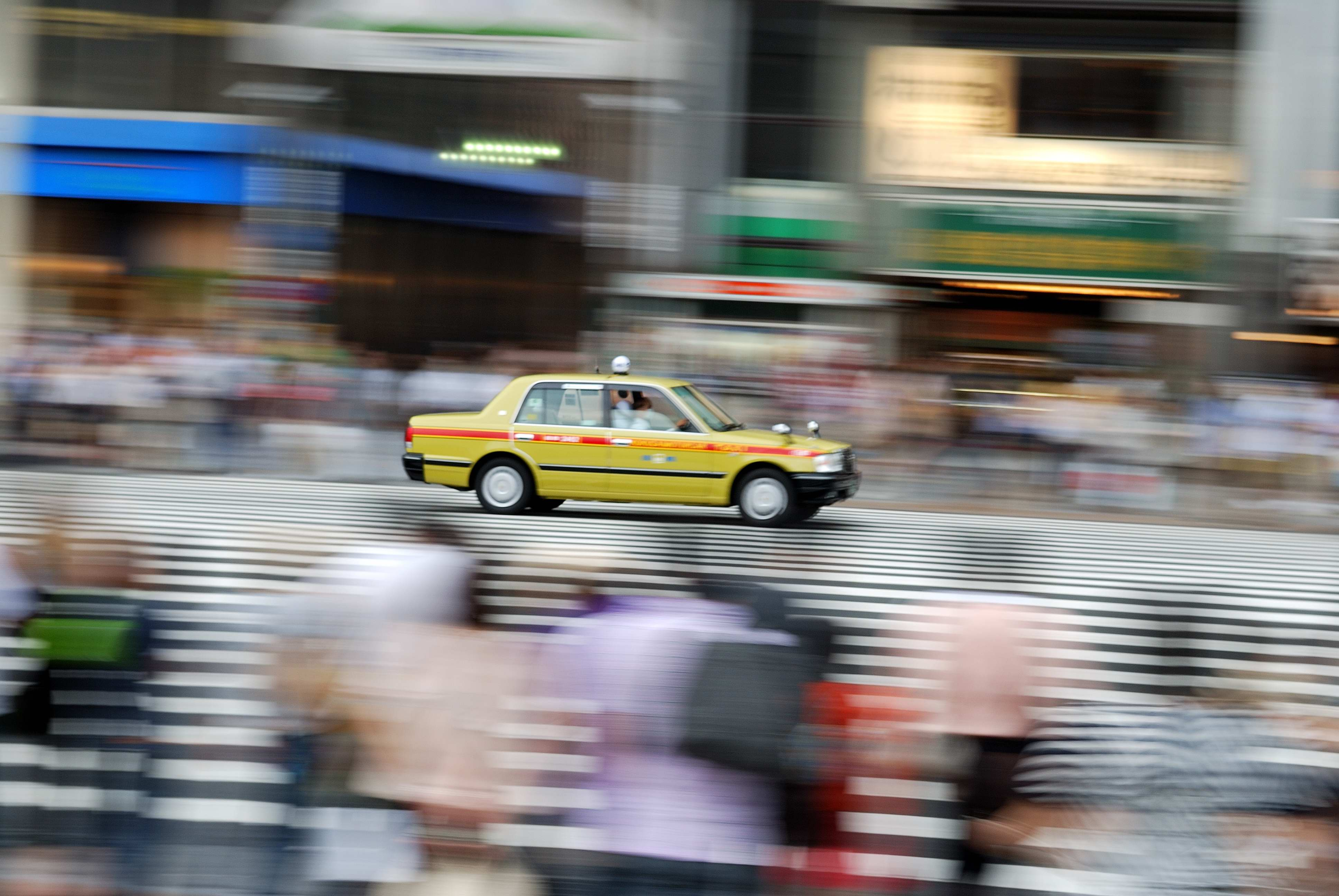 Taxi out side ueno station